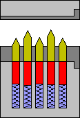 Schemazeichnung des Schlossaufbaus (offen)